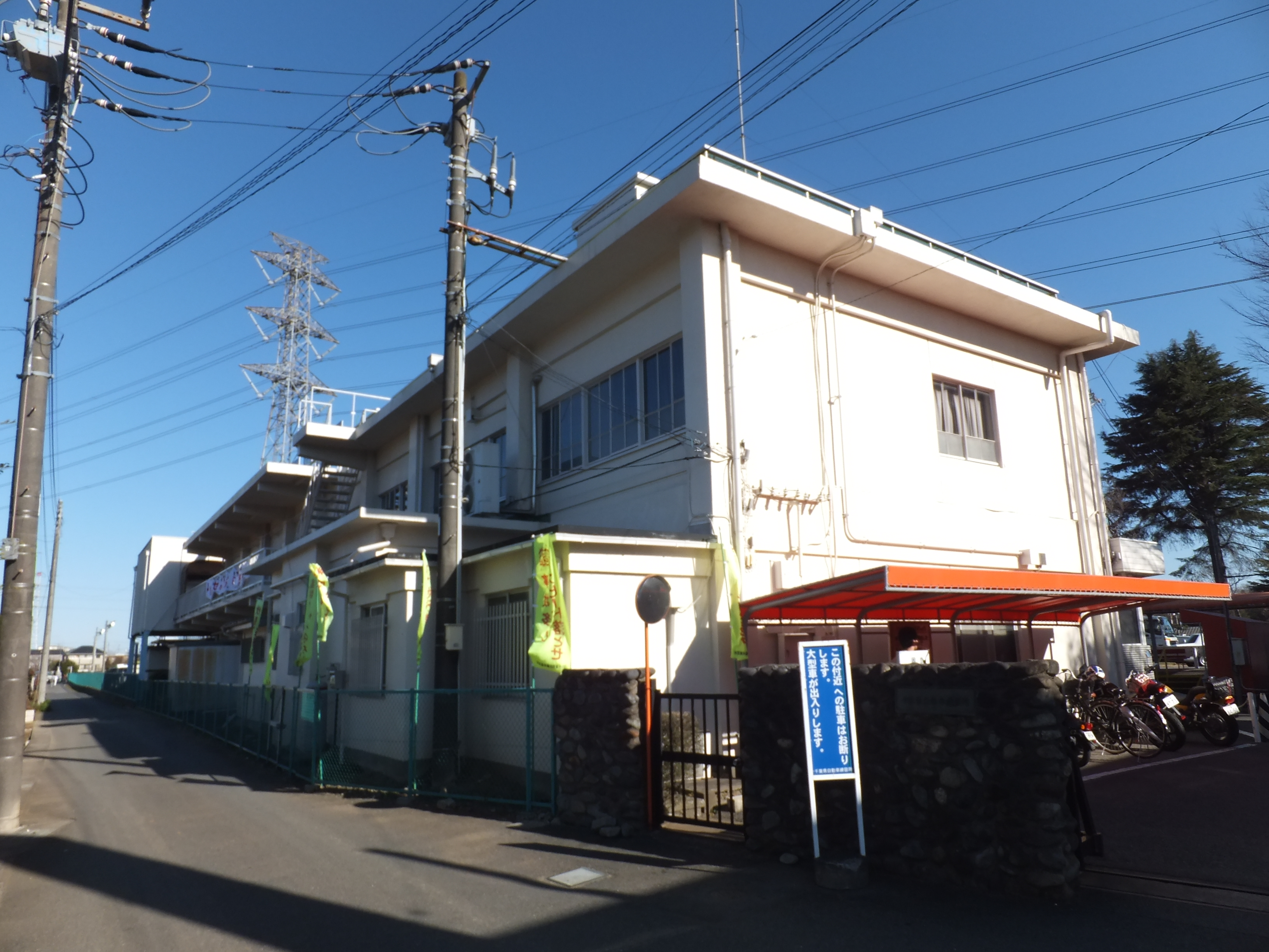 千葉県自動車練習所（千葉市若葉区）